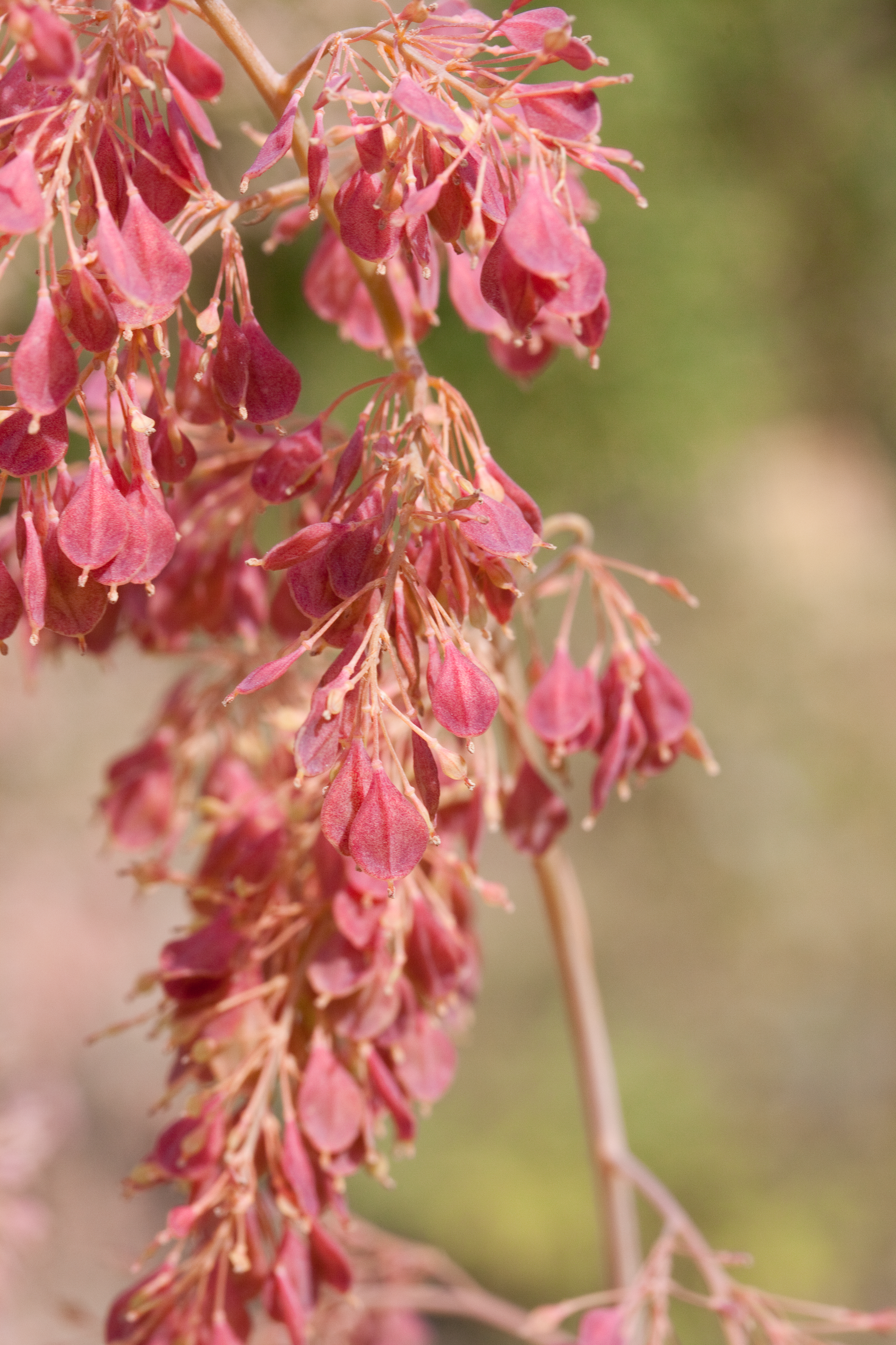 Jeunes fruits de Macleaya cordata - Jardin des Plantes - Paris - France